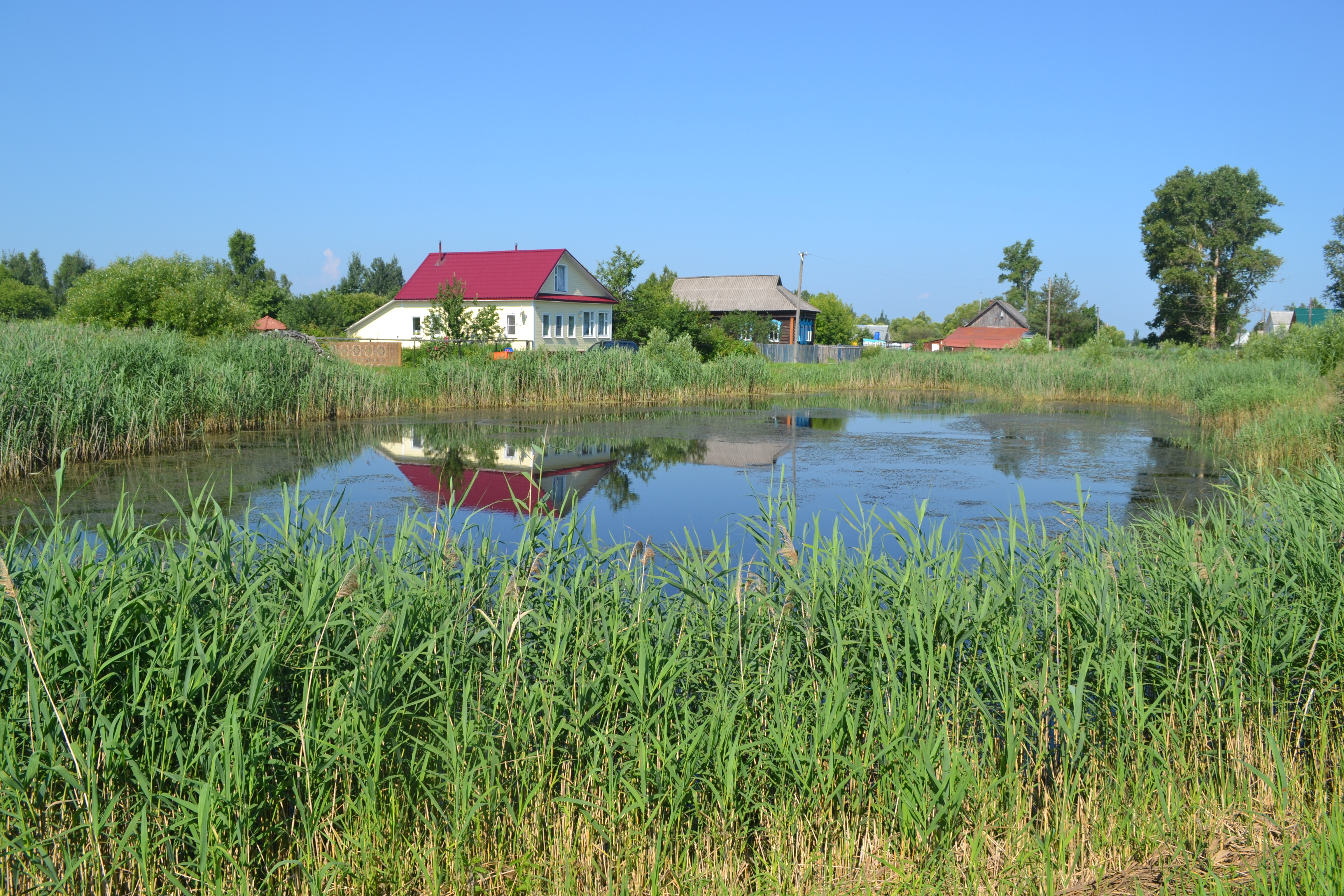 Пруд в деревне Волово (Шатурский район)